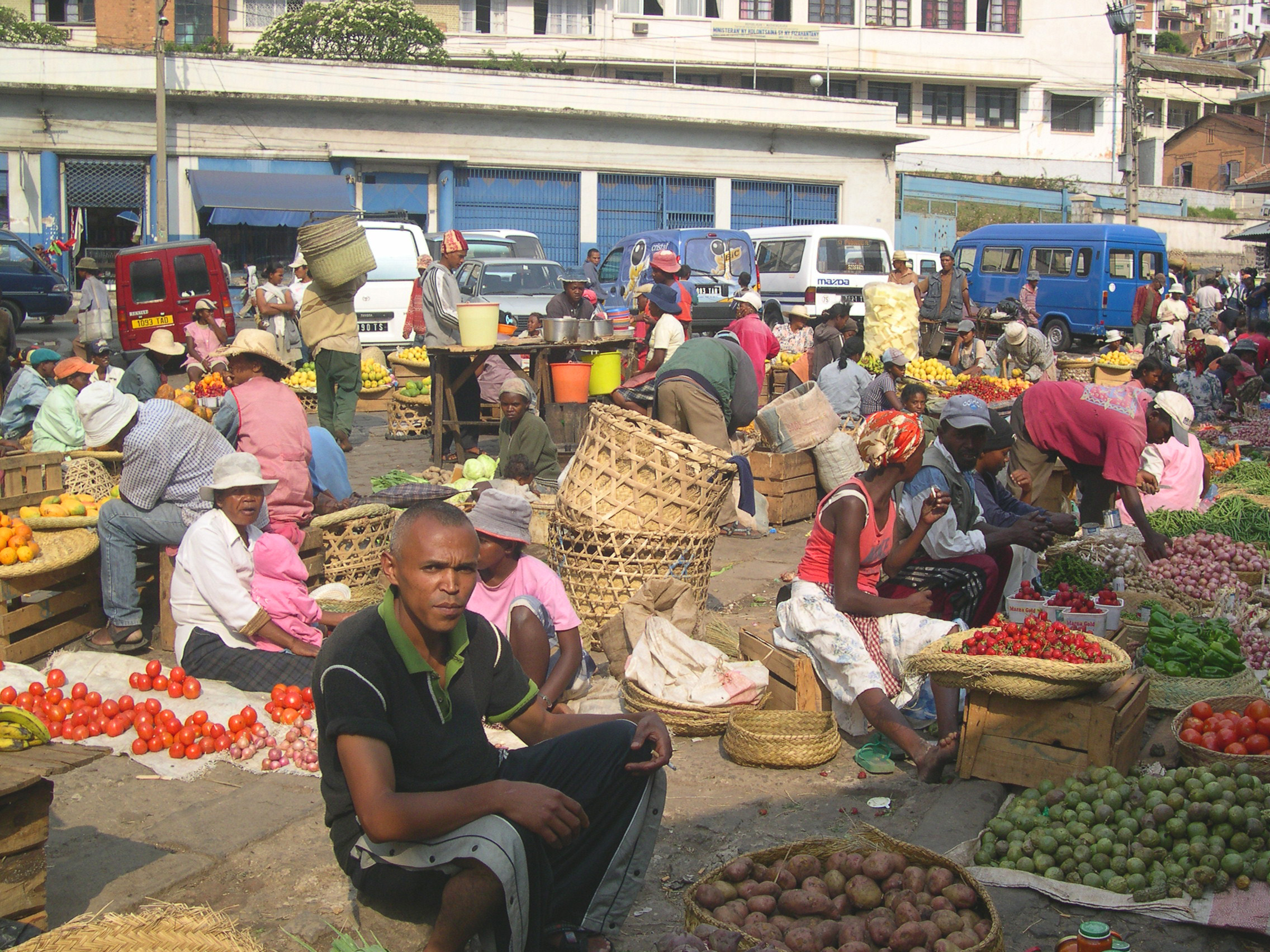 Street vegetable market